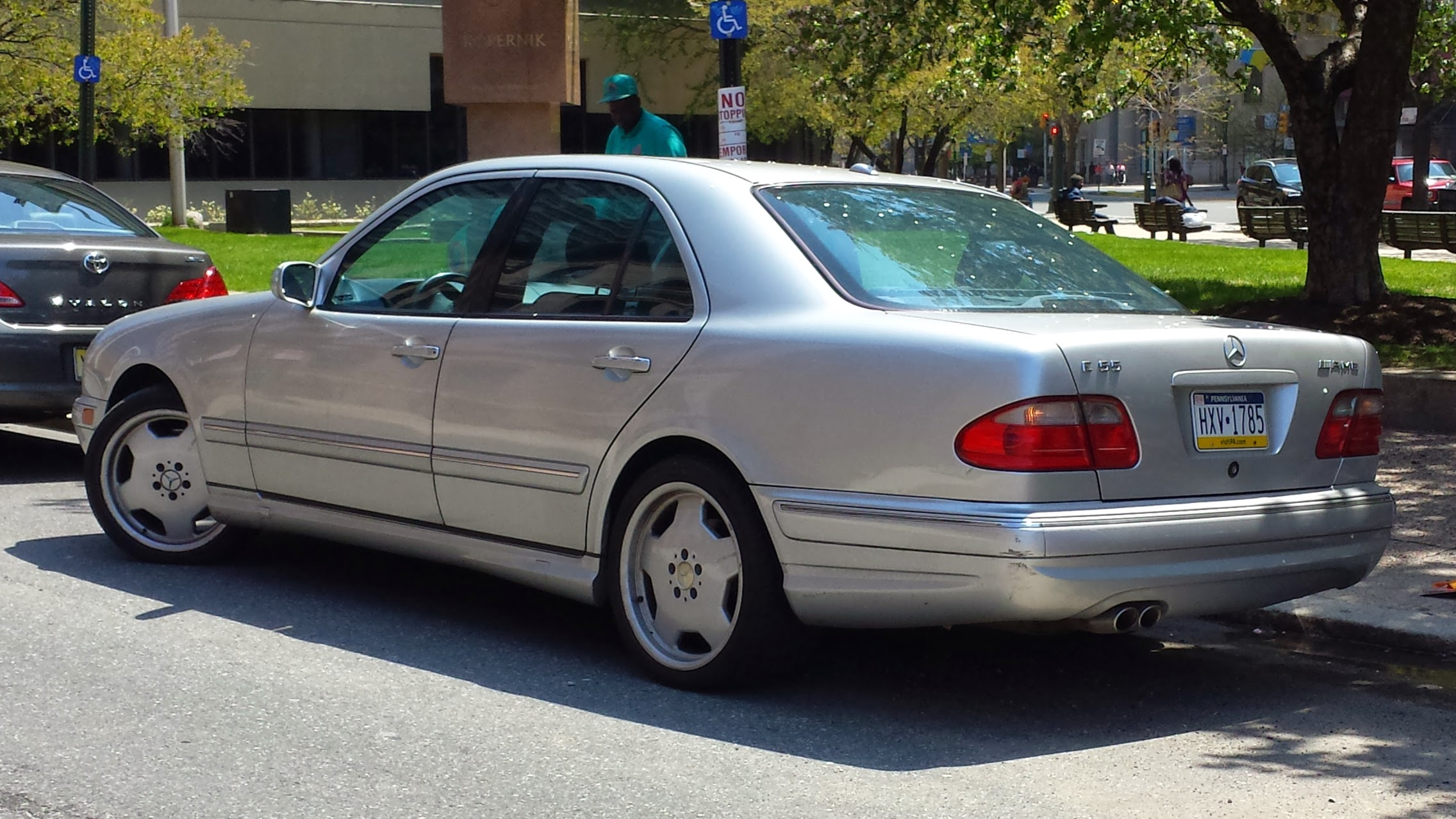 Mercedes-Benz E 55 AMG